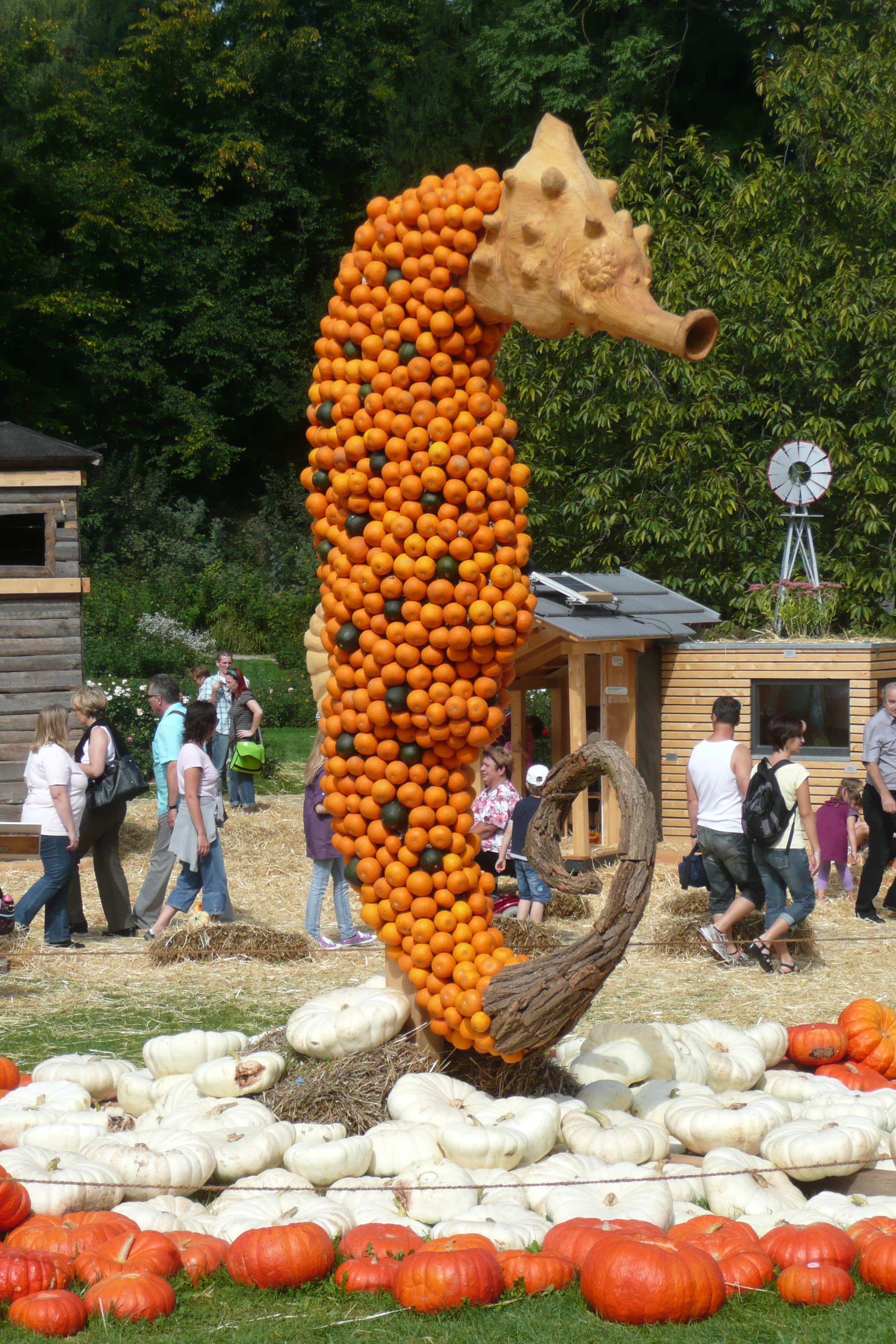 Kürbisausstellung Ludwigsburg 2010; Thema: "Kürbismeer"